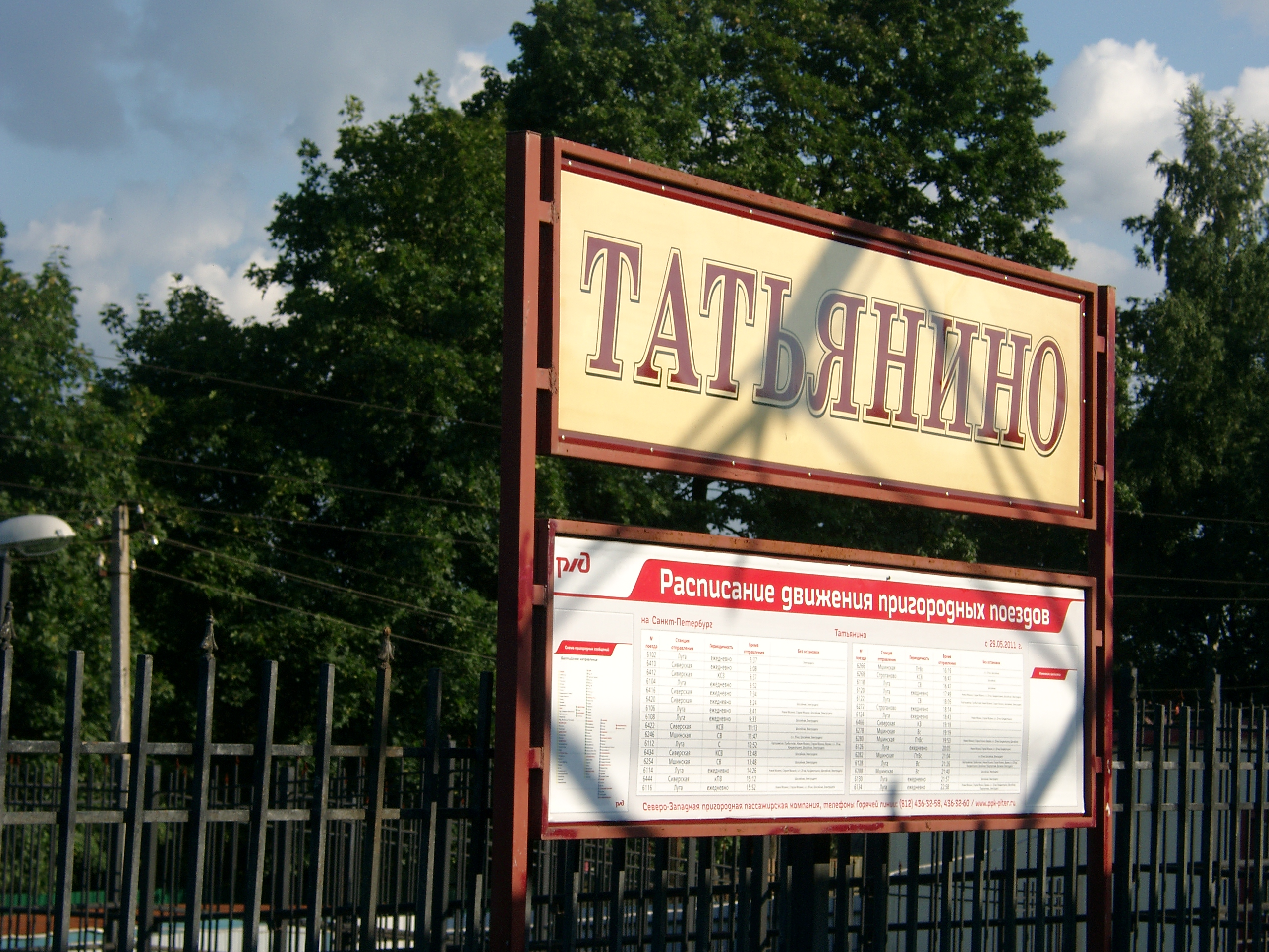 Станция Татьянино, Ленинградская область, Россия. Указатель с названием на платформе.